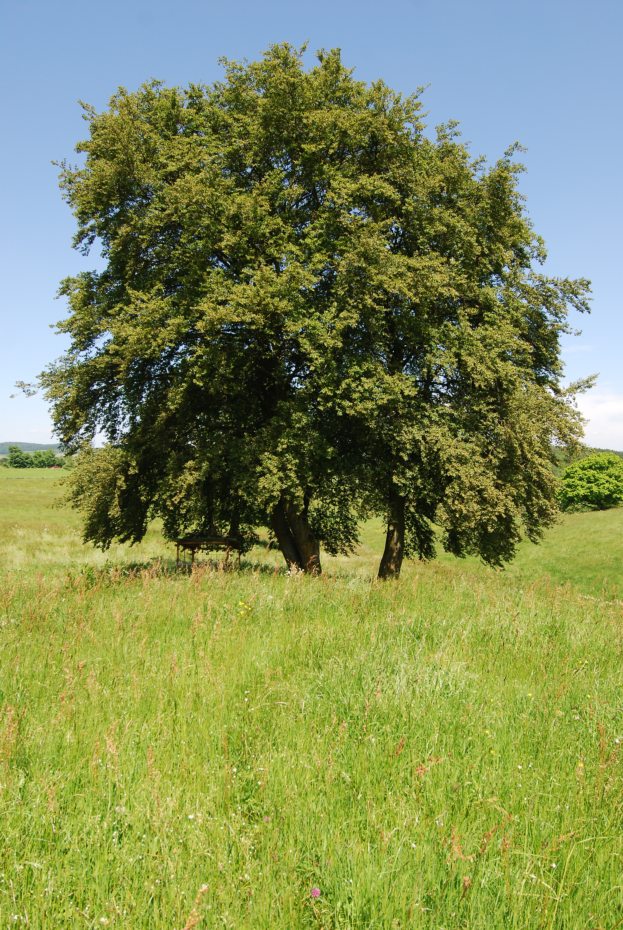 Naturdenkmal 2.2.07 „Hudebuchen“, südliche Baumgruppe, im Hochsauerlandkreis bei Oberschledorn (zu Medebach) an dem Alter Weg. Die südliche Baumgruppe der Hudebuchen bestehend aus Rotbuchen (Fagus sylvatica) stockt auf einer weiten Grünlandfläche südlich von Oberschledorn. In unmittelbarer Nähe steht die Büschel-Eiche, die ebenfalls ein Naturdenkmal ist. Die Büschel-Eiche ist auf dem Foto rechts im Hintergrund zu sehen.